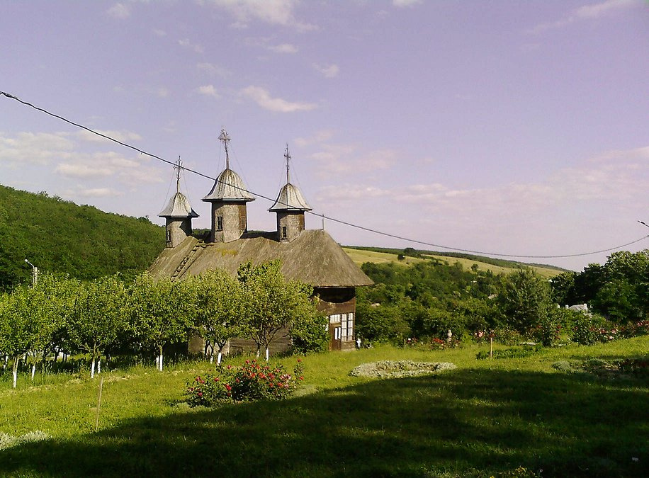 În centrul satului,în cimitir sec.XIX